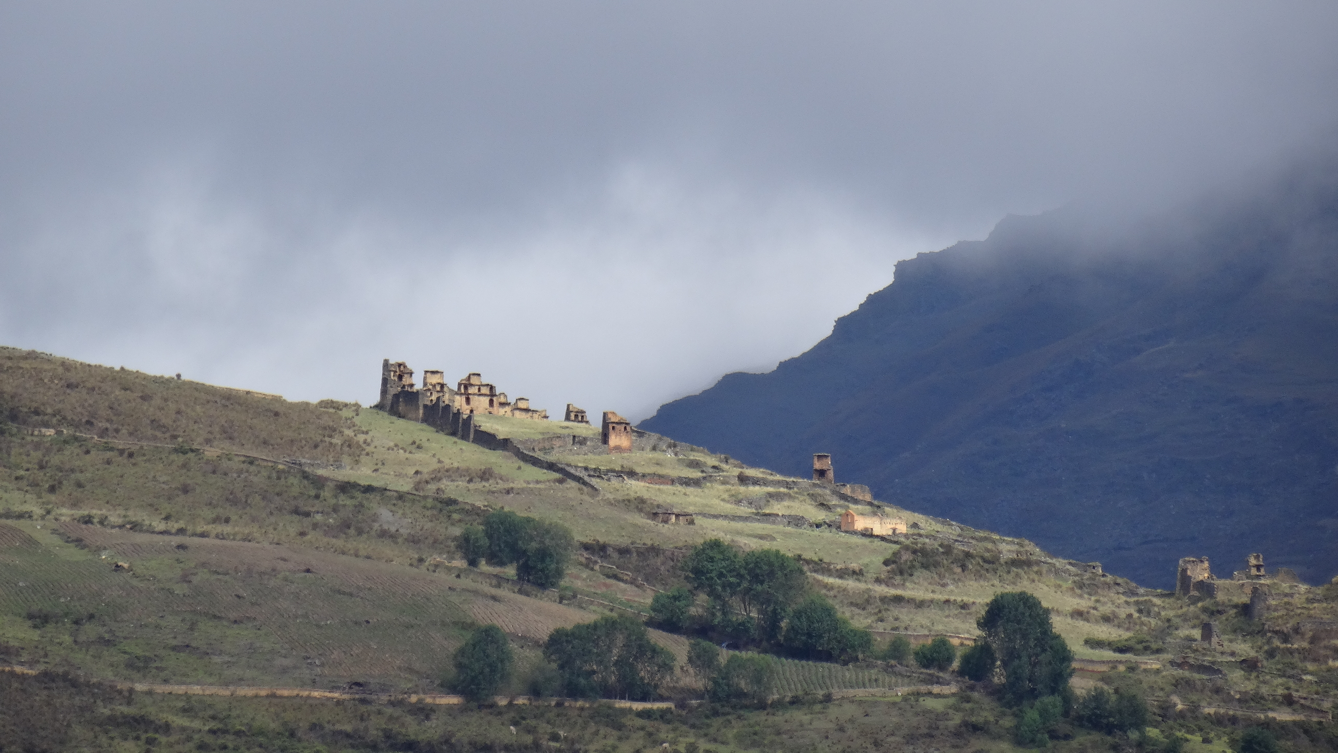 Vista parcial de la ruinas de Piruro desde la trocha Tantamayo - Punta Rada.